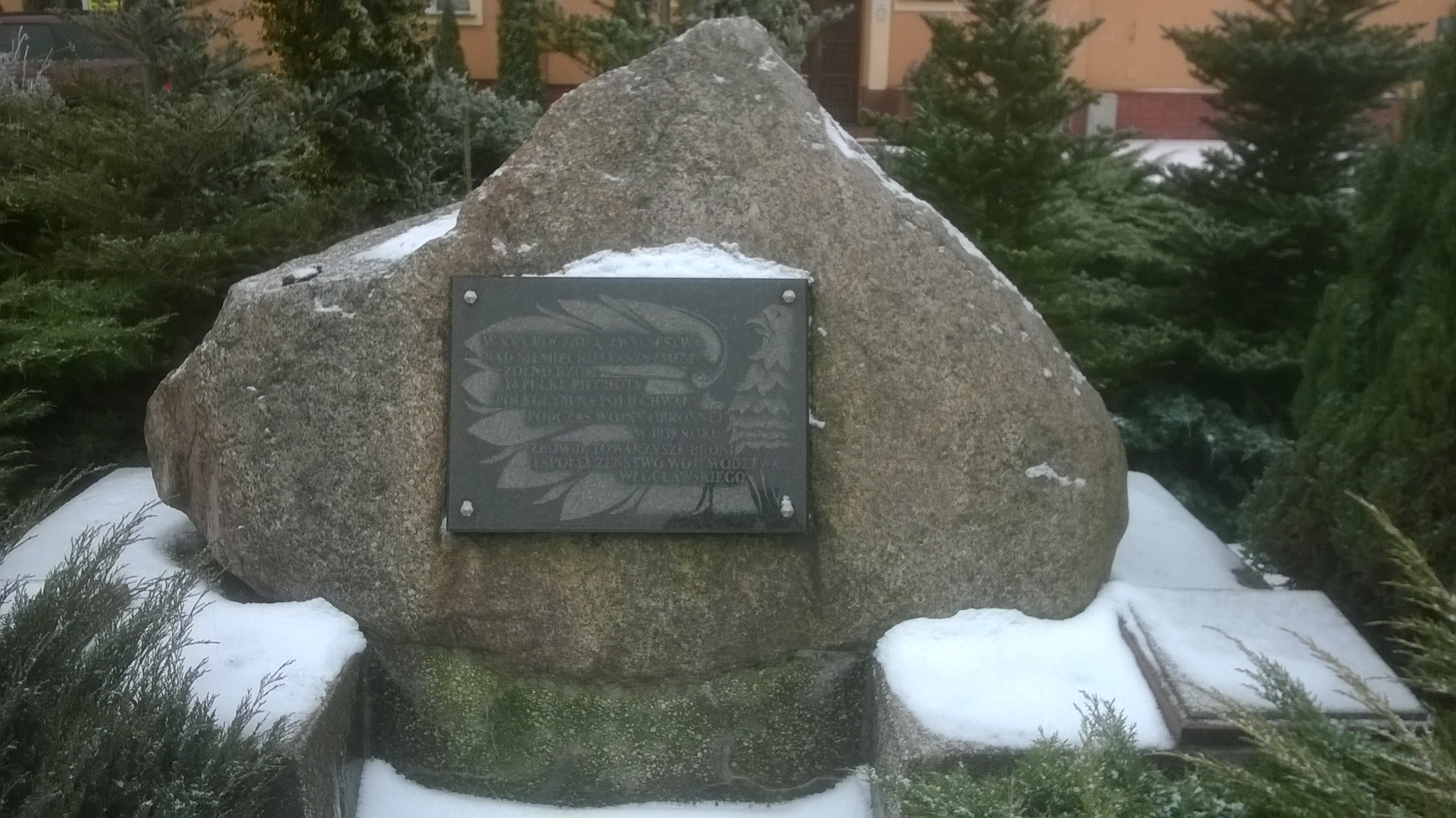 Pomnik poświęcony żołnierzom 14pp - usytuowany przy dawnym kasynie na ulicy Żytniej 83 (obecnie Sala Bankietowa CASINO). Stan ze stycznia 2017.